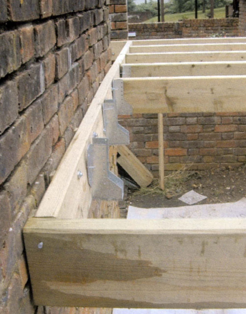 опора террасы на стену